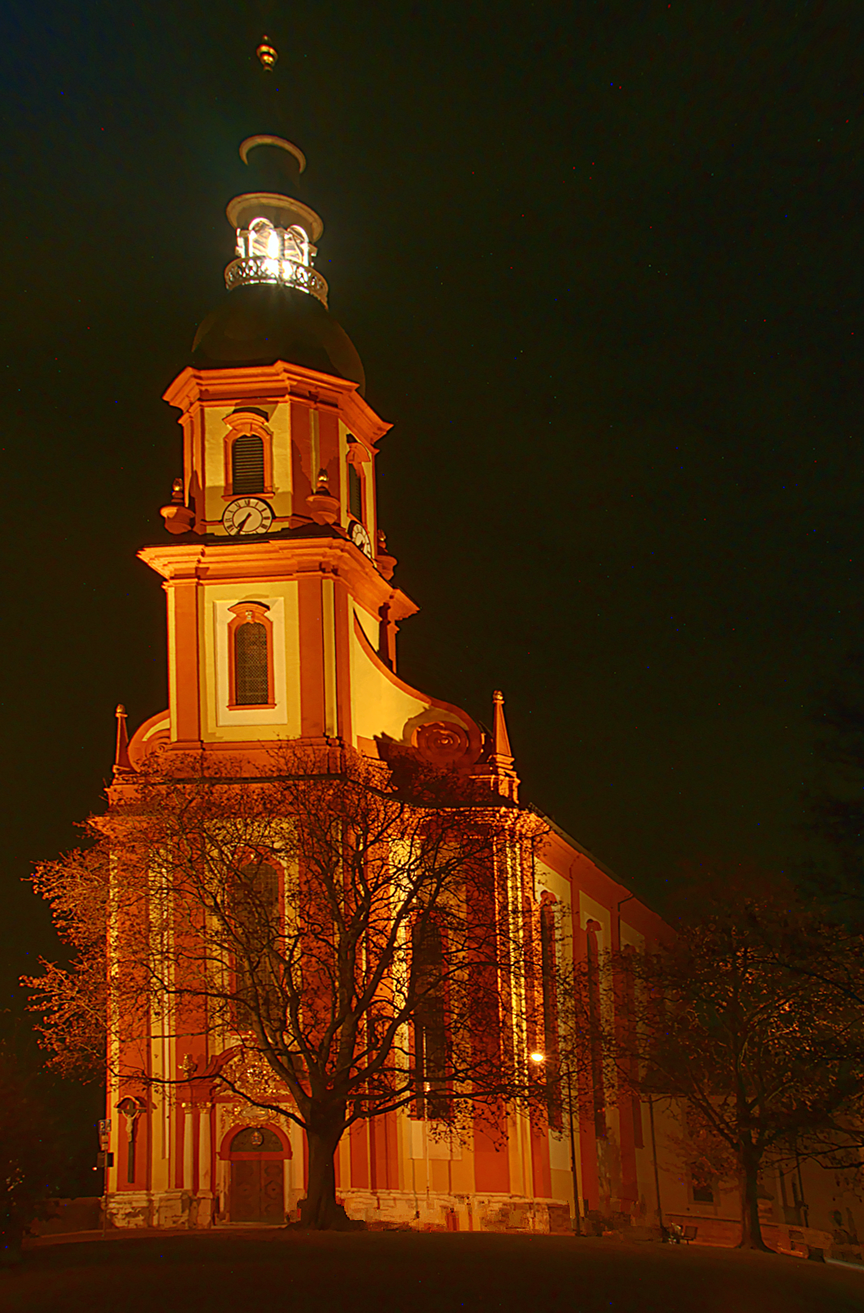 Basilika St. Paulin Trier, Nachtaufnahme zur Weihnachtszeit mit Christbaum in der Turmspitze